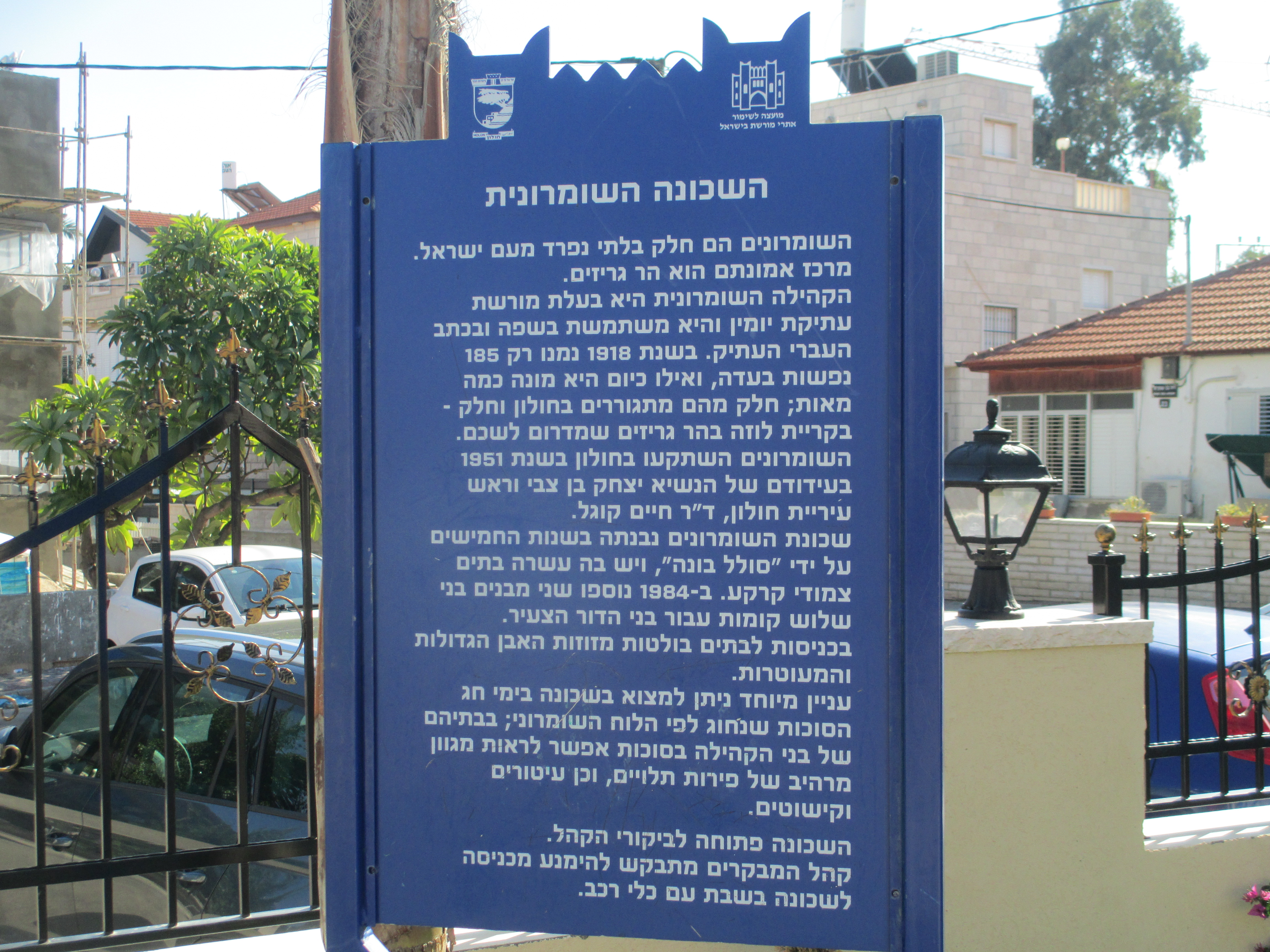 שלט הסבר בשכונת נווה פנחס בחולון